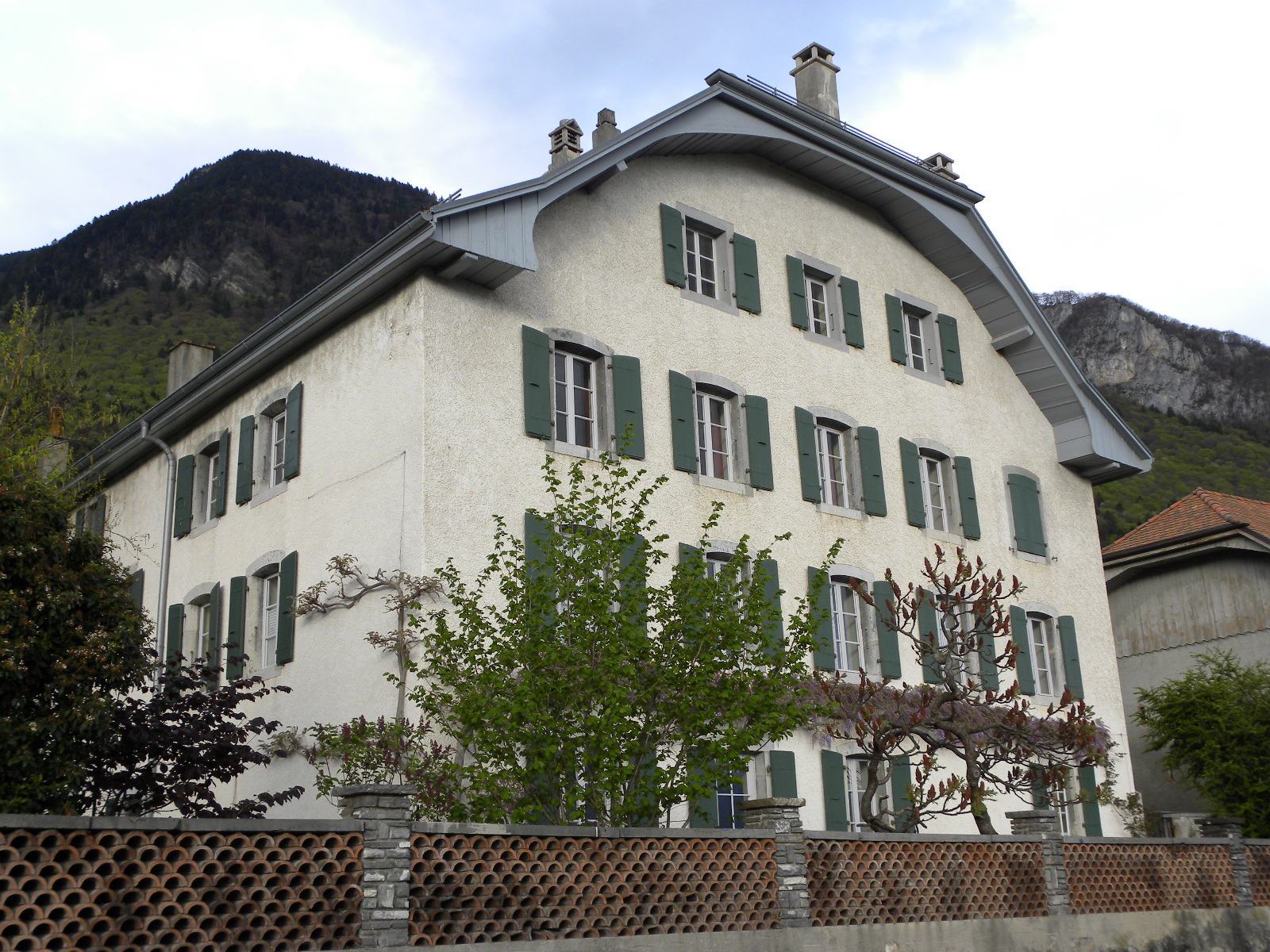 Maison d'Auguste Forel La Fourmillière Yvorne Vaud Suisse